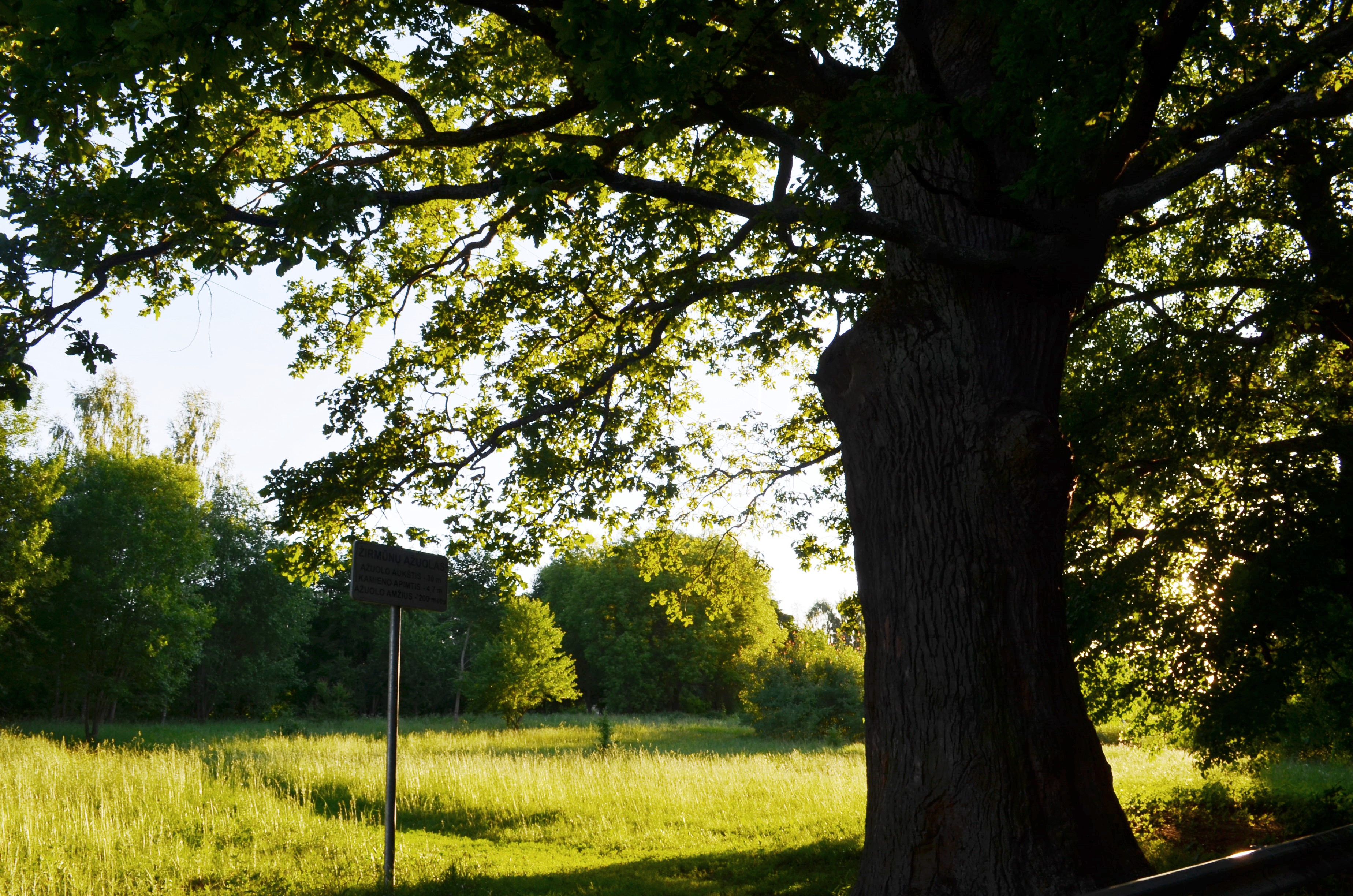 Žirmūnų ąžuolas netoli Valakupių tilto, Vilnius